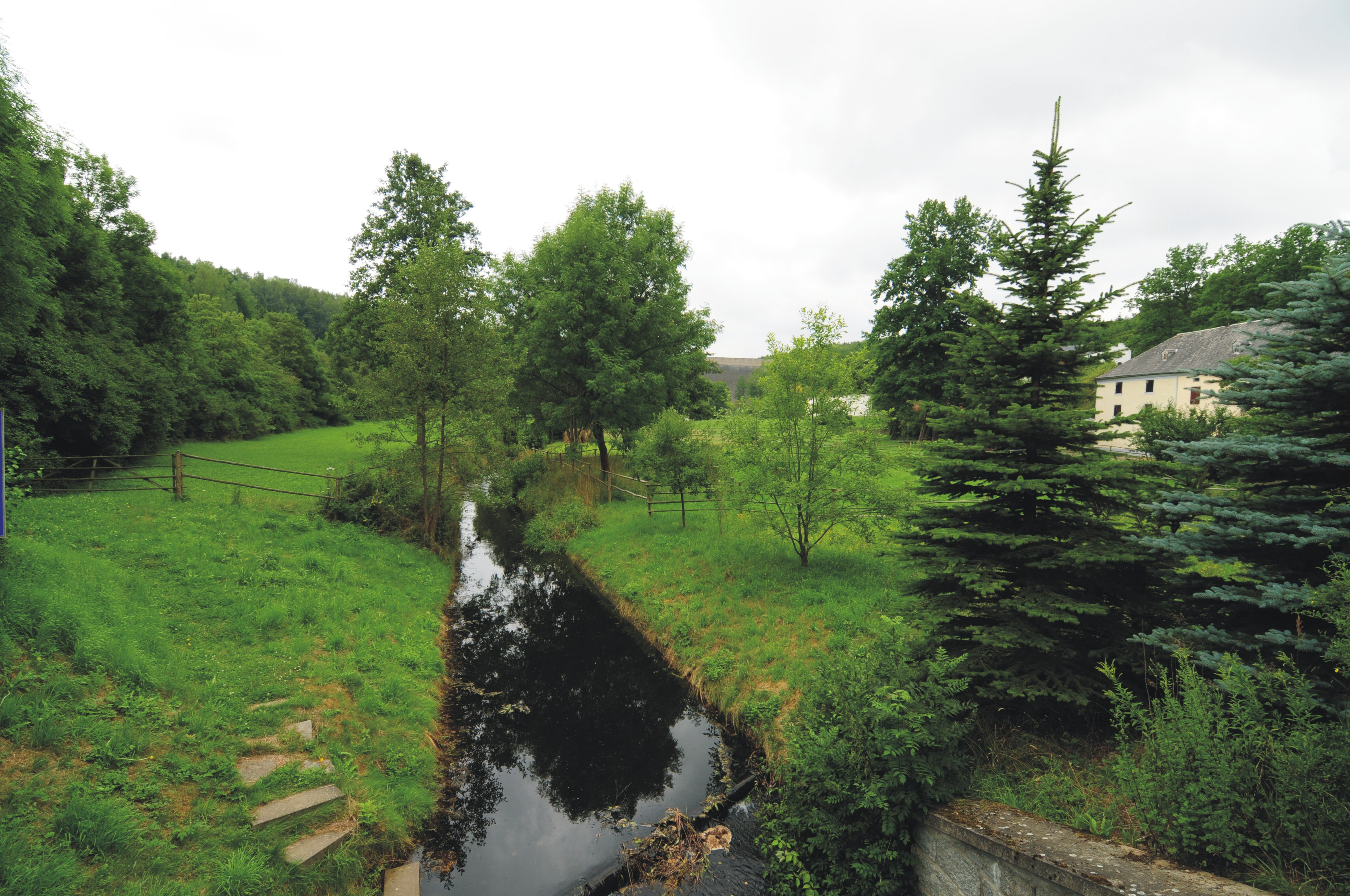 Feilebach in Dröda unterhalb der Talsperre Dröda (Gemeinde Weischlitz, Sachsen, Deutschland)